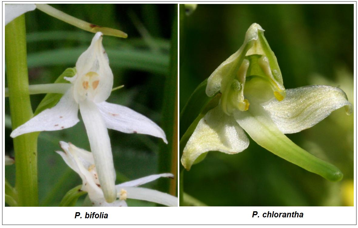 Platantera comune